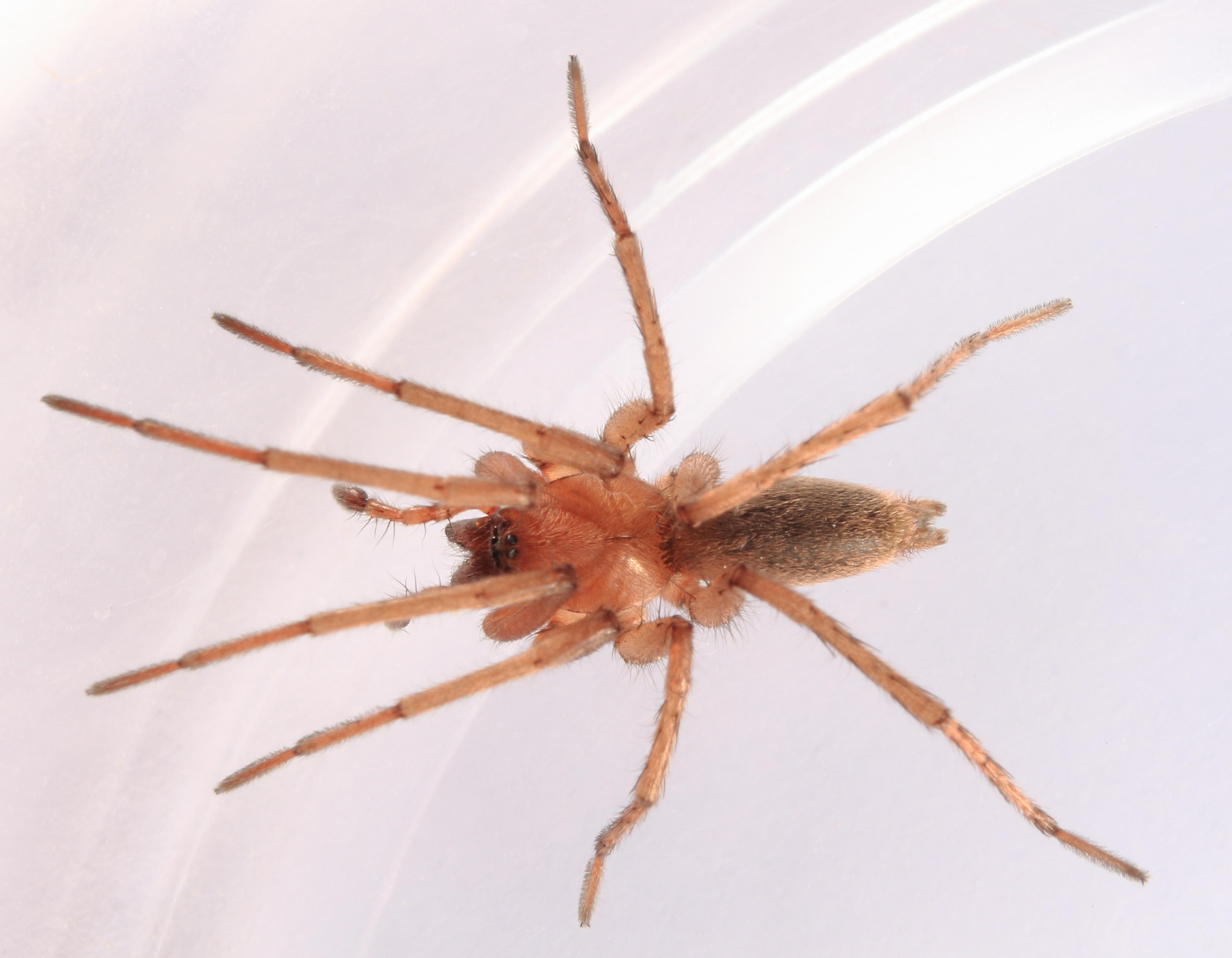 Drassodes vermutlich D. lapidosus, Körperlänge ca 8mm, gefunden im Garten Die abgebildete Spinne wurde am 7. Juni 2015 von Mhohner auf WP:RBIO/B bestimmt The spider shown here has been identified by Mhohner on WP:RBIO/B 2015, June 7th